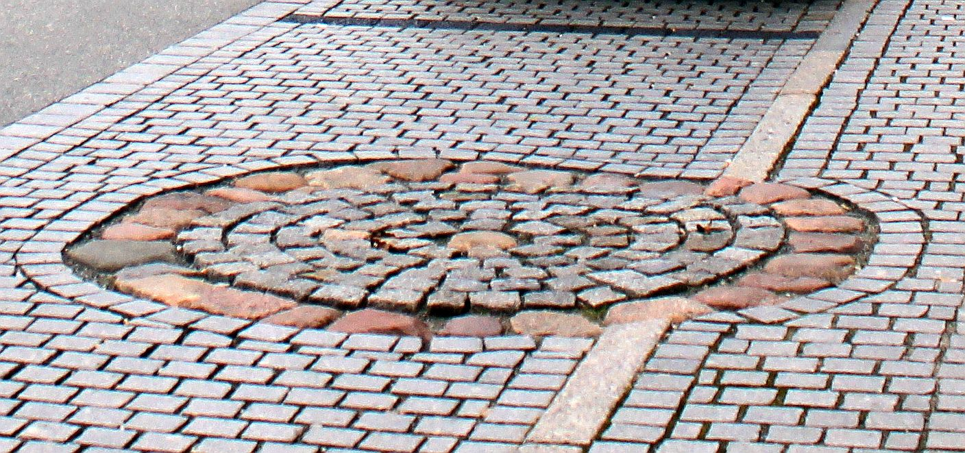 Kennzeichnung eines sich ehemals auf dem heutigen Gelände des Marktes befindlichen Brunnens in Elsterwerda.